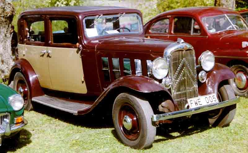 Citroen 15 AL Berline 1933